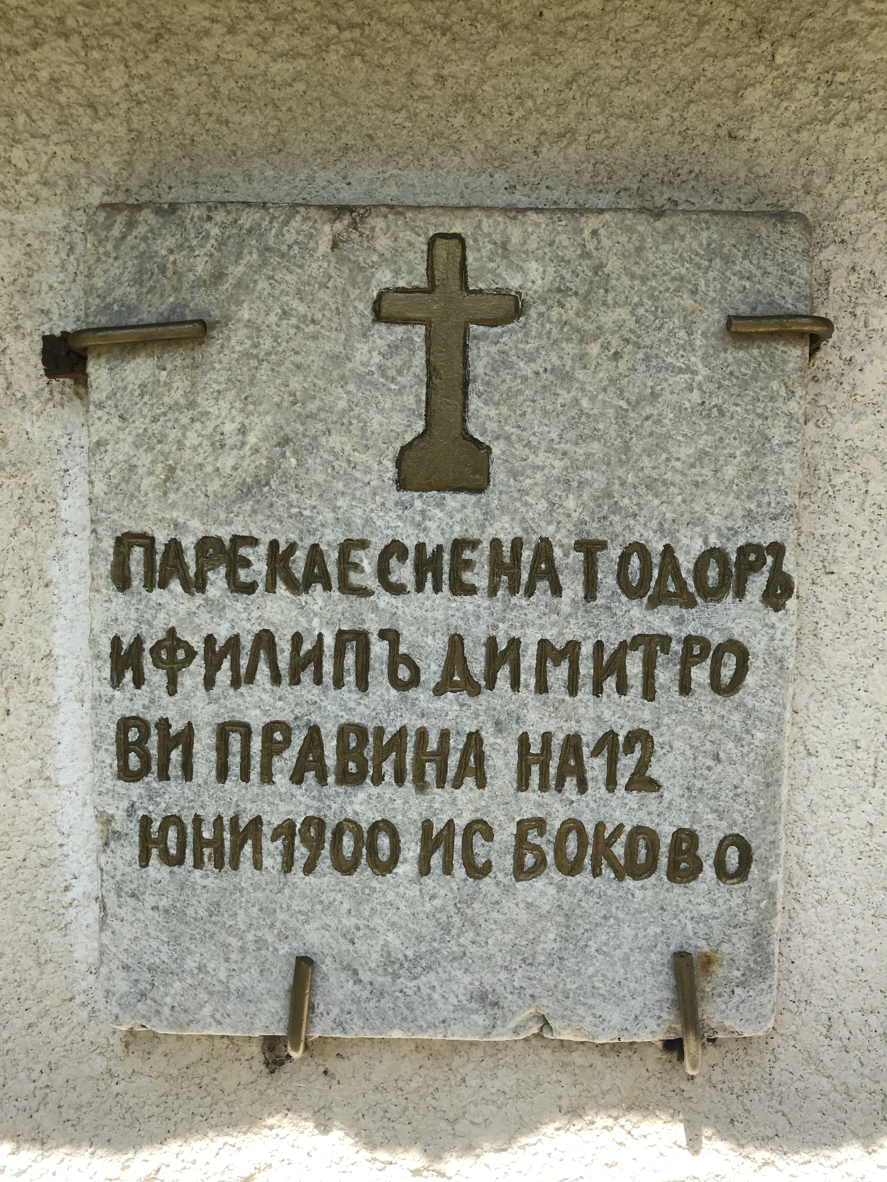 Каменна плоча на “Свети Спас”, с. Бойково